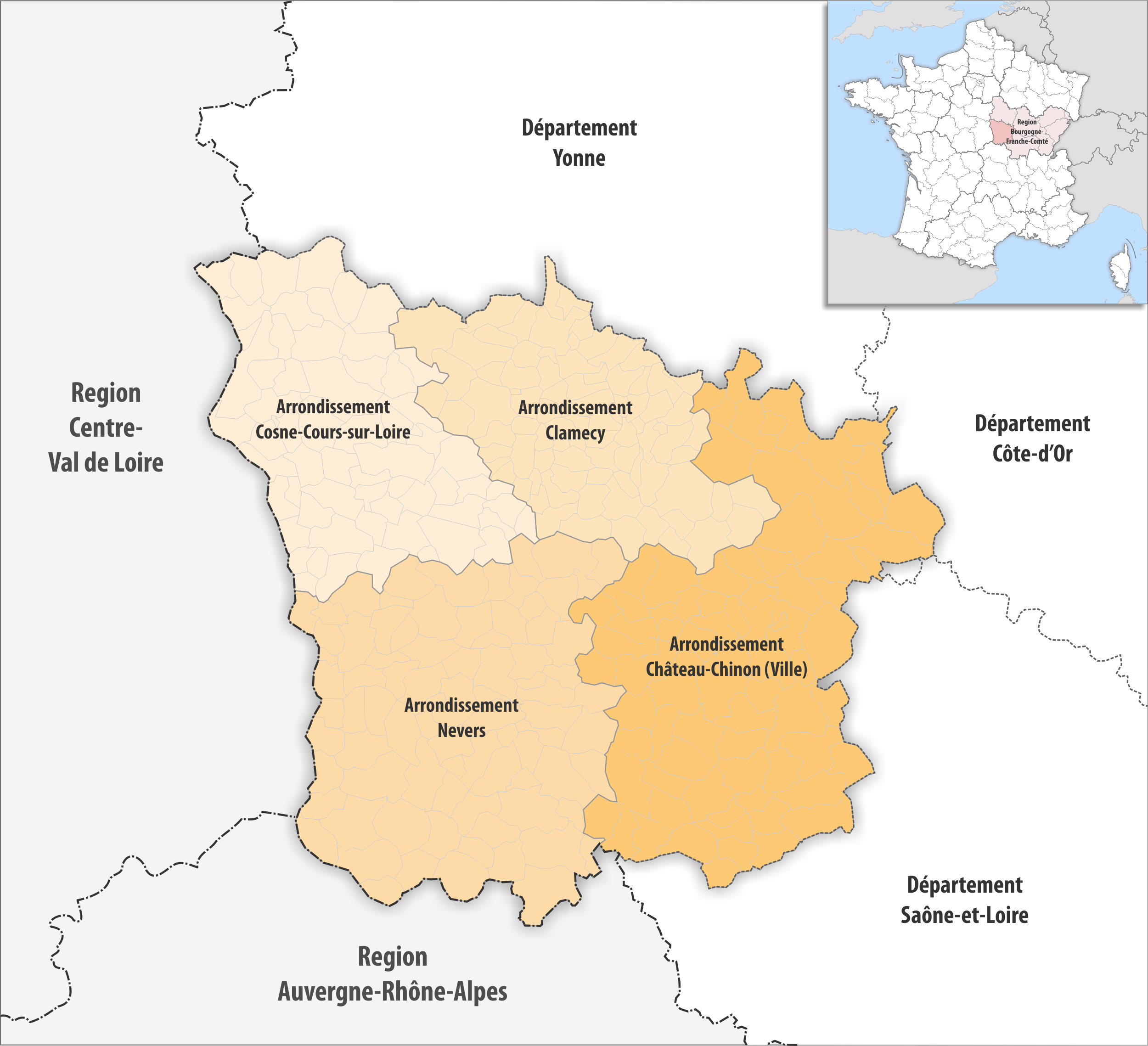 Gemeinden und Arrondissemente im Departement Nièvre